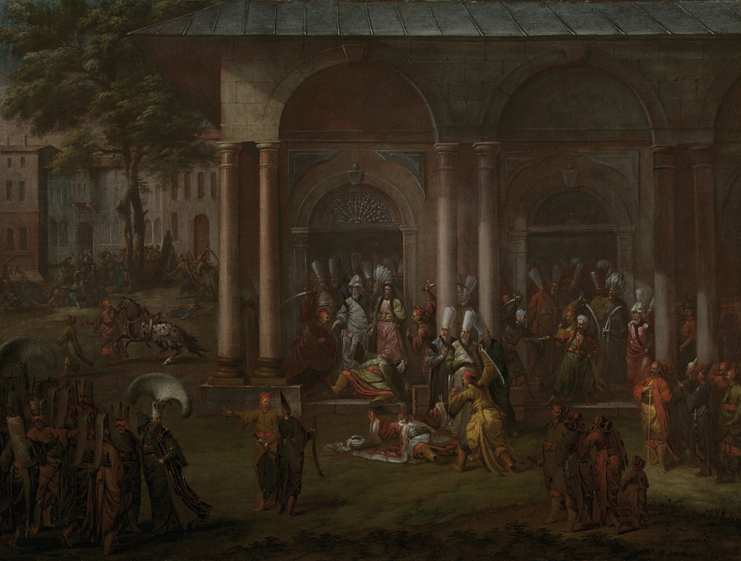 De moordaanslag op de leider van de opstandelingen Patrona Halil, 1730 De extravagante feesten van de ‘Tulpensultan’ zorgden voor veel onrust onder de bevolking. Op 28 september 1730 brak een opstand uit onder leiding van Patrona Halil, een Albanese zeeman. De rebellen slaagden de rebellen erin de sultan af te zetten en installeerden zijn neef Mahmud I.Nadat Mahmud I de troon had bestegen, bleven de rebellen voor onrust zorgen. Zij probeerden posities in de regering te bemachtigen en eisten steeds meer invloed. Mahmud nodigde hen met een smoes uit op het paleis, waar zij één voor één werden omgebracht. Rechts wordt Patrona Halil overmeesterd, terwijl links de dienaar die op zijn paard paste al is vermoord. In het midden ziet men de groot-vizier Damad Ibrahim pasja uit zijn paleis komen, vergezeld door een van de opperrechters en een van de thesauriers. Uit de andere deur komen de admiraal en de andere opperrechter naar buiten, terwijl links een officier van de wacht bevelen geeft aan een groep janitsaren in krijgstenue. Op de achtergrond kan men nog zien hoe de dienaren van de groot-vizier worden afgeslacht. Hiermee kwam de opstand definitief tot een eind. Collection: schilderijen; Vanmour serie; Jean Baptiste Vanmour (1671-1737), olieverf op doek, ca. 1730-1737